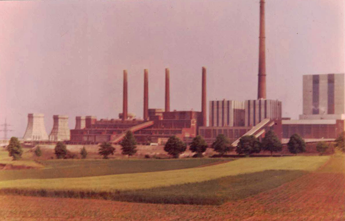 Kraftwerk in Offleben, inzwischen abgerissen.